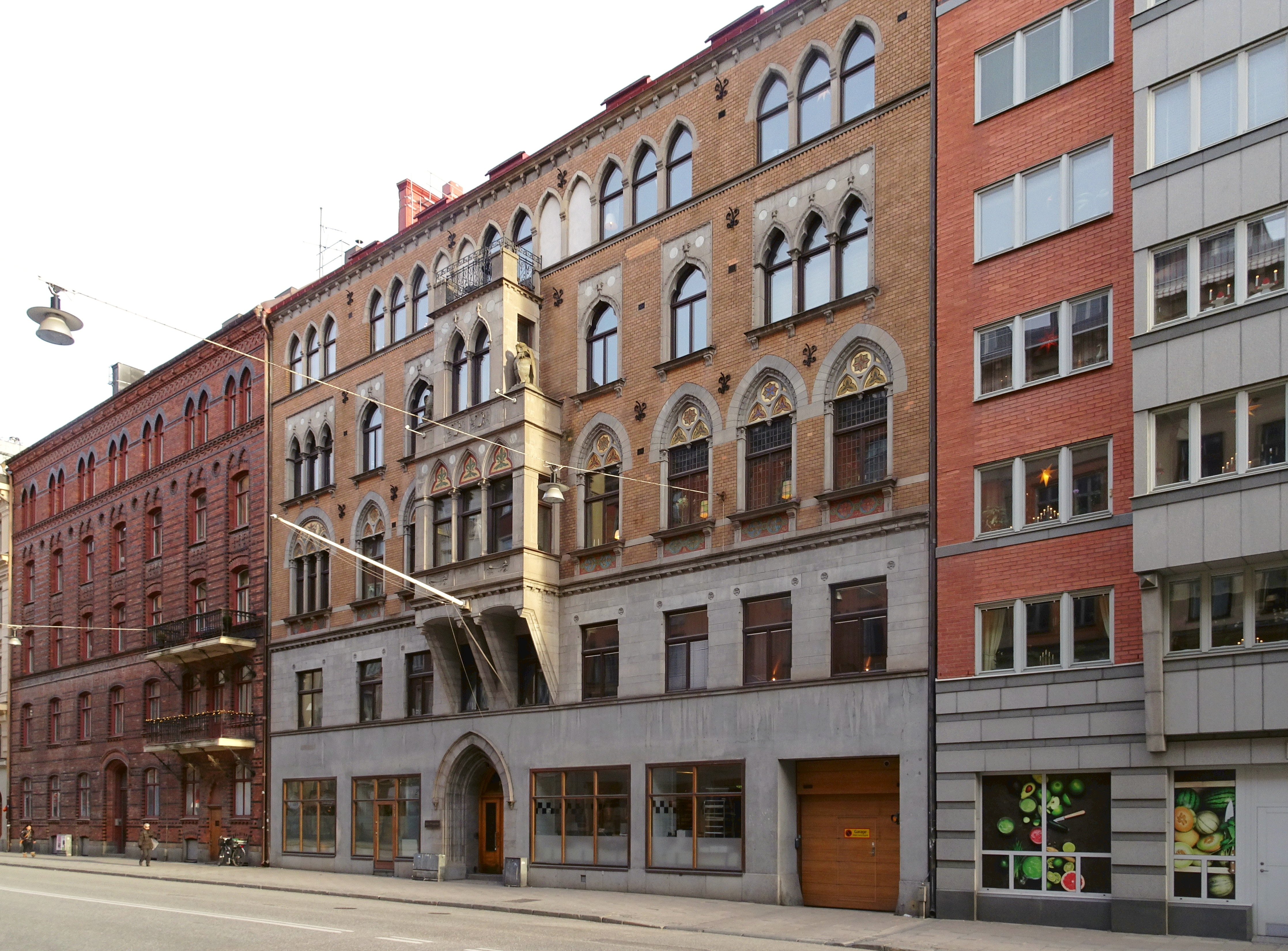 Pagen 14, Scheelegatan 24, f.d. Rügheimer & Beckers stråhattfabrik, arkitekt Alfred Hellerström